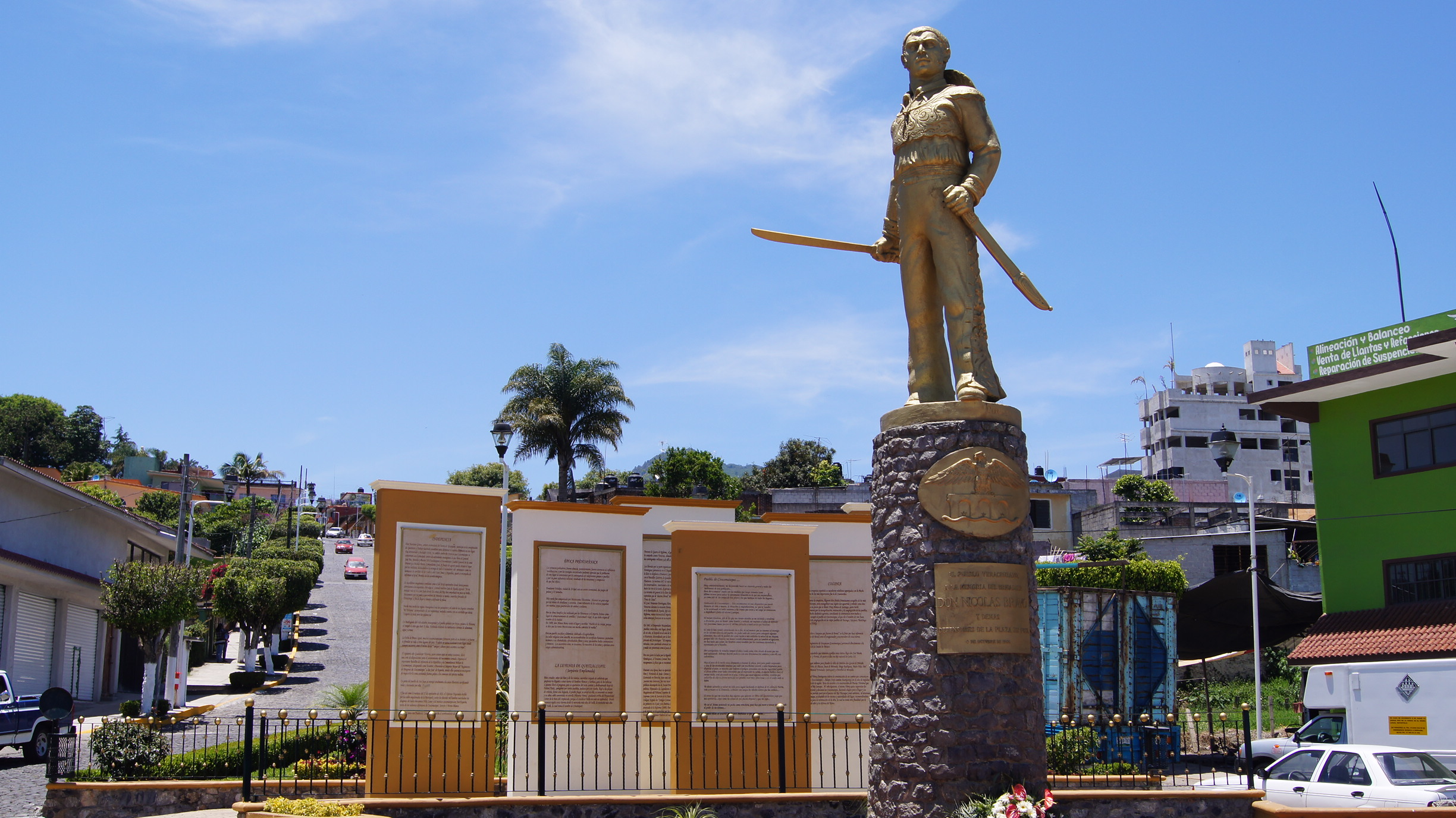 Escultura en bronce creada por el guanajuatense Juan Fernando Olaguíbel Rosenzweig en el año de 1964. Este monumento está dedicado también a la memoria de los defensores de la plaza de Coscomatepec en 1813. El monumento fue inaugurado el 4 de Octubre de 1966. La imagen puede contener: cielo y exterior